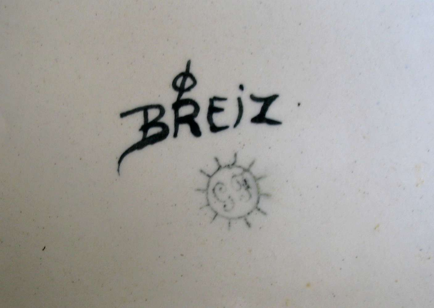 Plat à décor breton, Manufacture Fourmaintraux, Desvres, France, Marque GF et Breitz